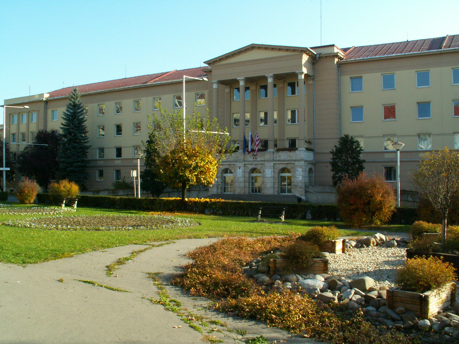 Mestský úrad Banská Bystrica